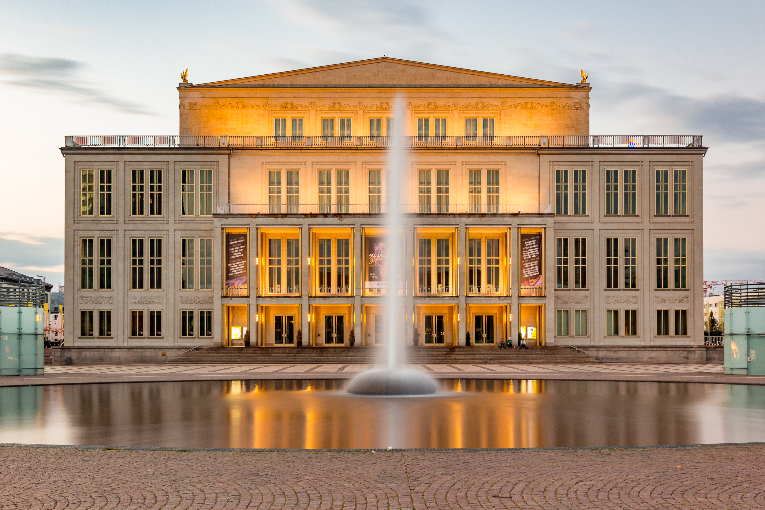 Das Opernhaus in Leipzig am Augustusplatz.